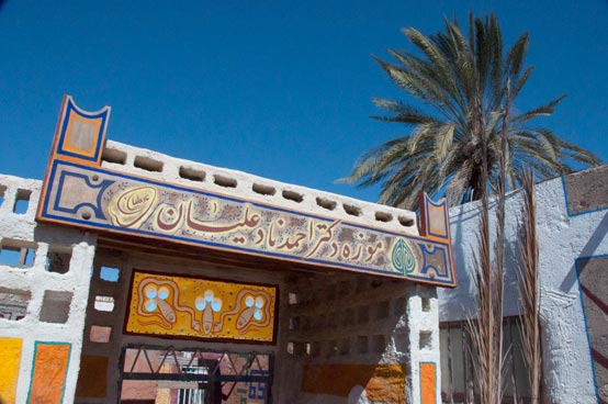 ورودی موزه دکتر نادعلیان در جزیره هرمز